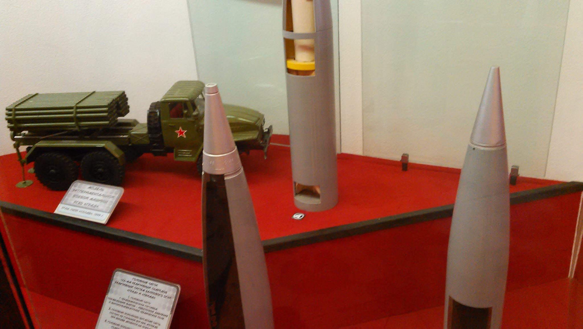 Головные части для реактивных снарядов реактивных частей залпового огня "Град": слева осколочно-фугасные, справа - зажигательные, а сзади - рекламно-информационные.